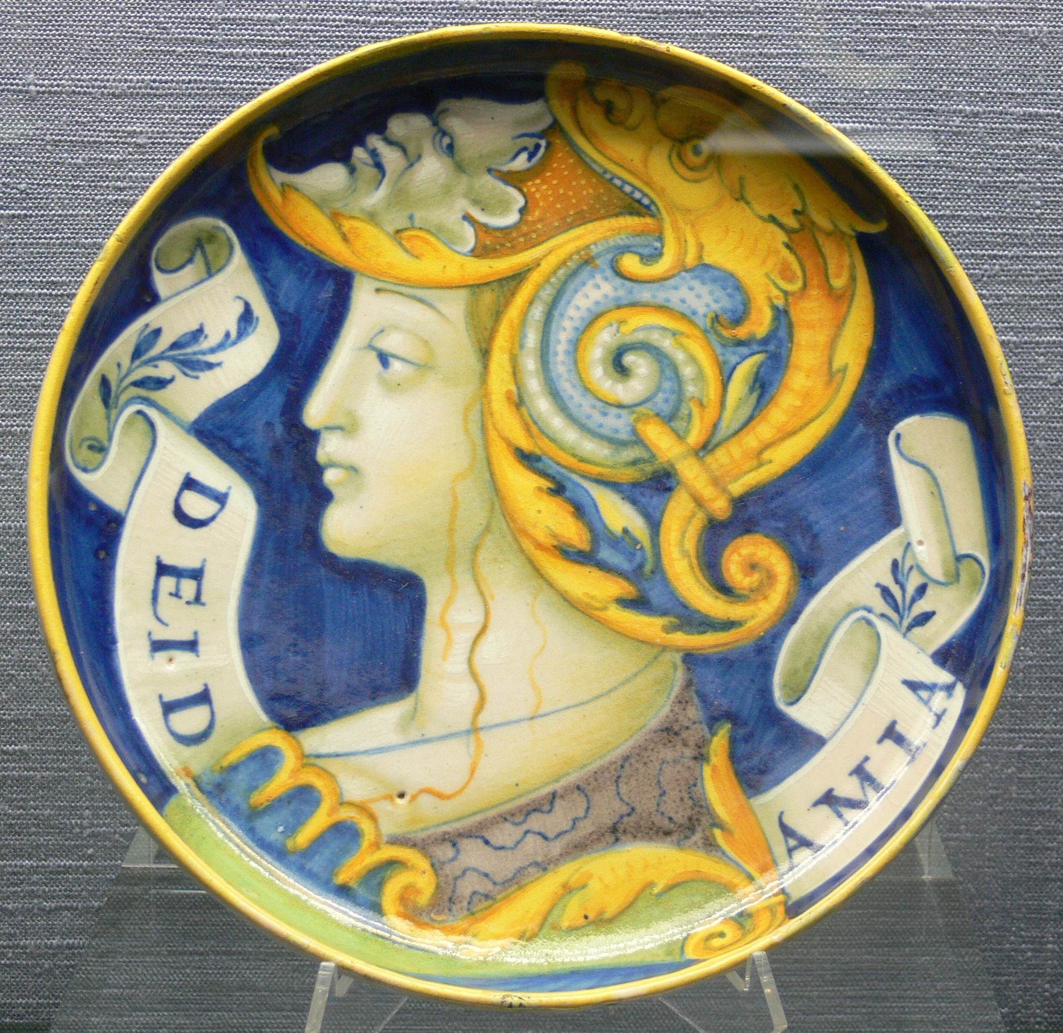 Schale mit dem Bildnis der Deidamia (Gattin des Achilleus), Nicolò da Urbino, um 1525 Kunstgewerbemuseum Berlin, Inv. Nr. 17,39